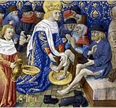 Ludvík IX.